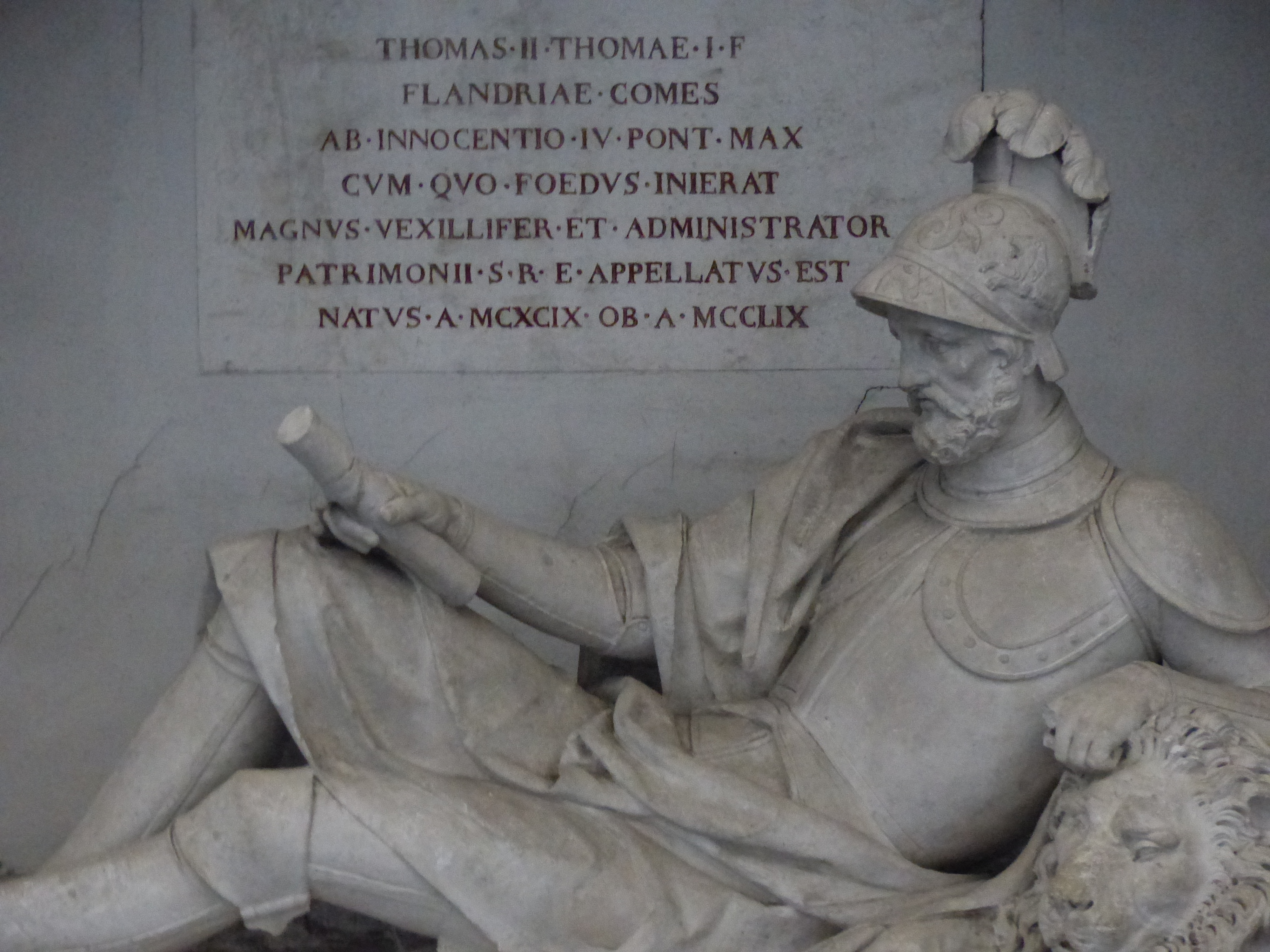 Cénotaphe de Thomas II de Piémont à l'abbaye d'Hautecombe